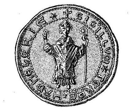 Scan: Das große Siegel des Landes Hadeln, 13. Jh.